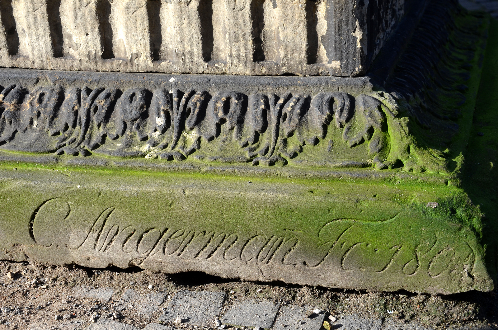 Der - denkmalgeschützte - Grabstein des Kaufmanns und Berghandlungs-Oberfaktors Carl Ludewig Vezin (6. August 1747 - 5. September 1805) wurde im Zuge der Umgestaltung des Platzes an der Goseriede und dem Alter St.-Nikolai-Friedhof in Hannover als Teil einer neu zusammengestellten Denkmal-Gruppe südlich der Nikolaikapelle versetzt. Am Fuß des Grabmals findet sich der Hinweis auf den Bildhauer „C. Angerman, 1808“ ...